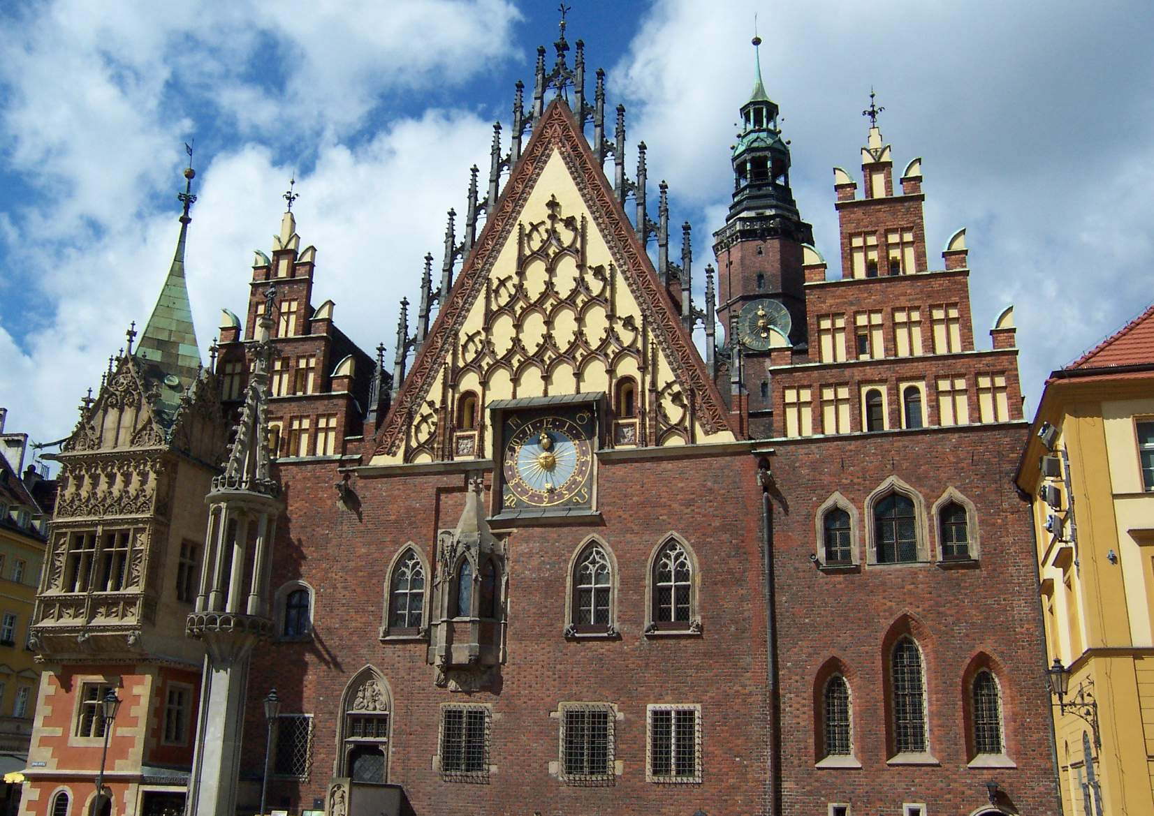 Hôtel de ville de Wroslaw, (Wrocław).